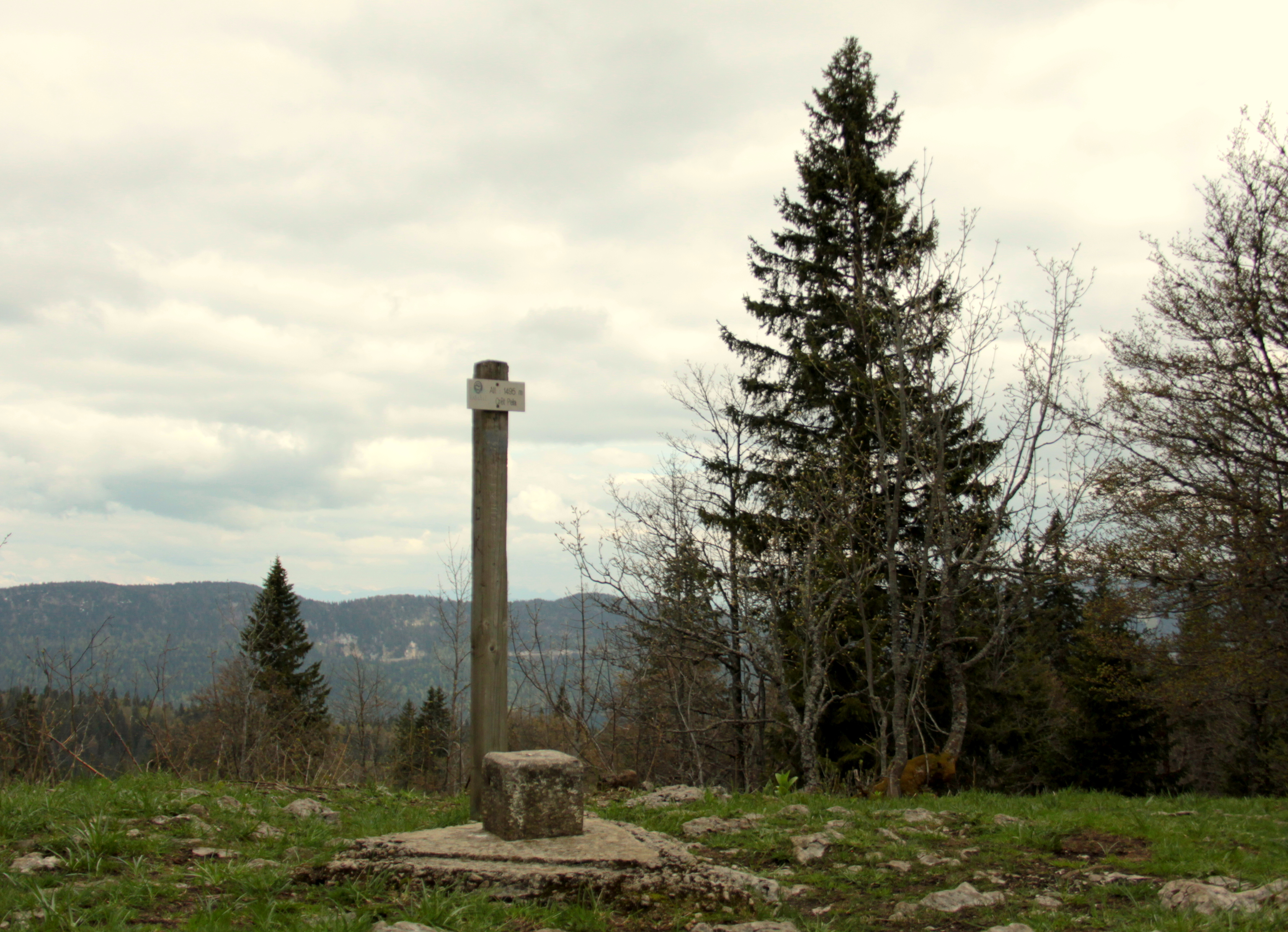 Le sommet